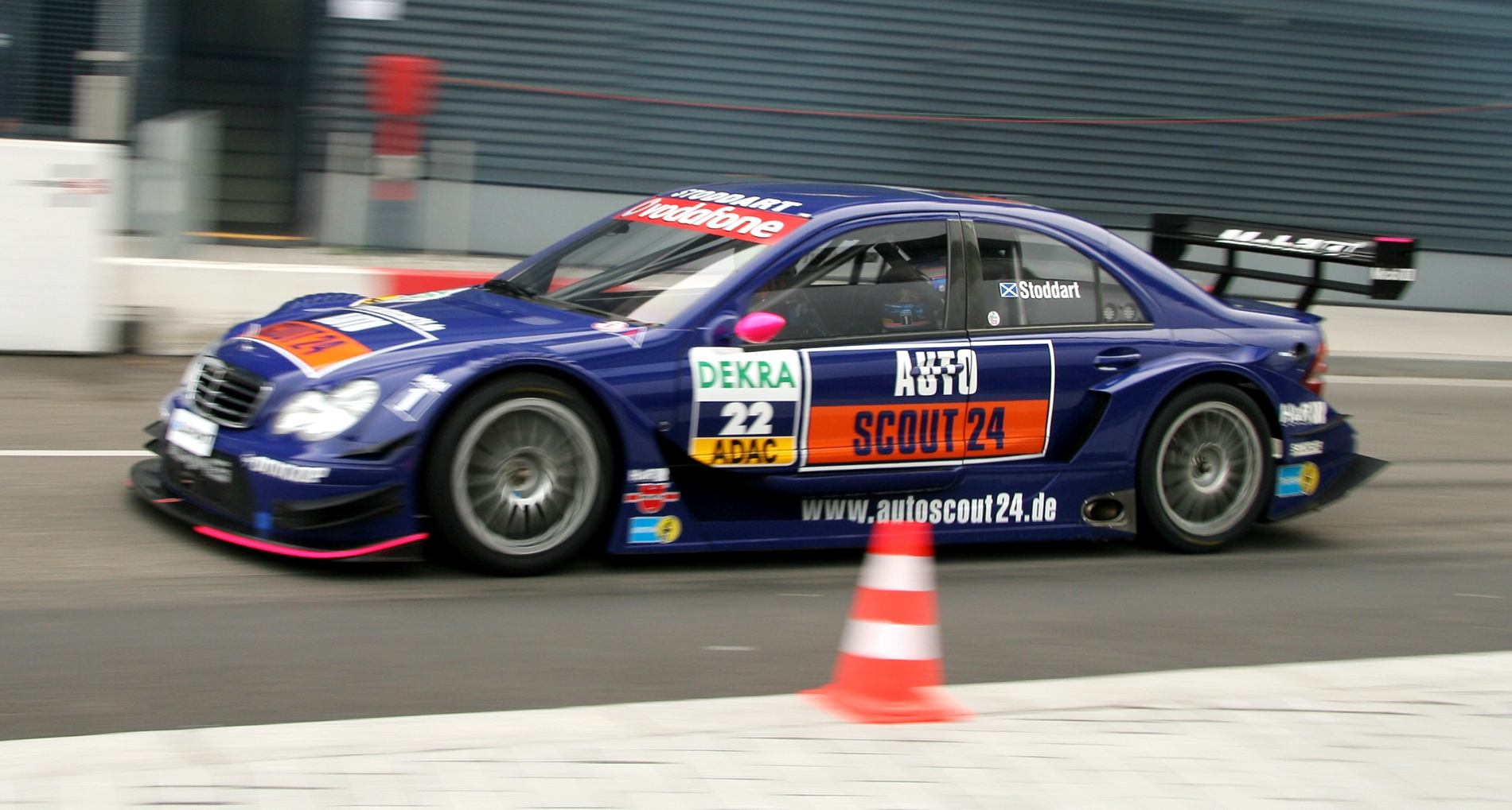 DTM car Mercedes-Benz AMG 2006 (C-Class, W203), Stoddart (driver)